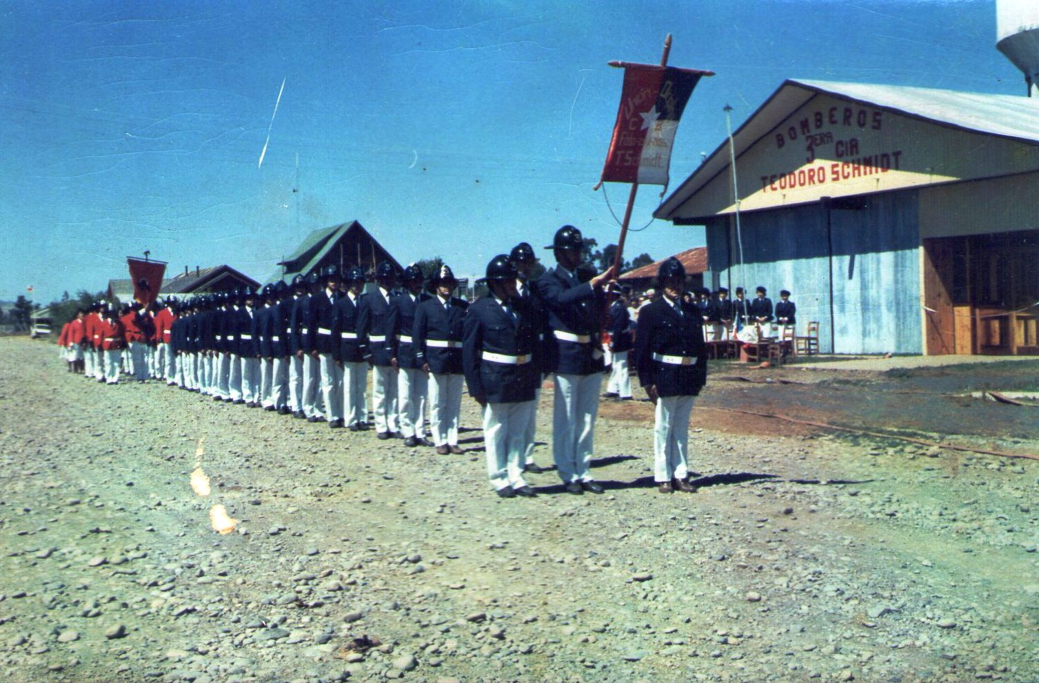 Formación de la Tercera compañía de Bomberos de Teodoro Schmidt cuando pertenecía al Cuerpo de Bomberos de Freire